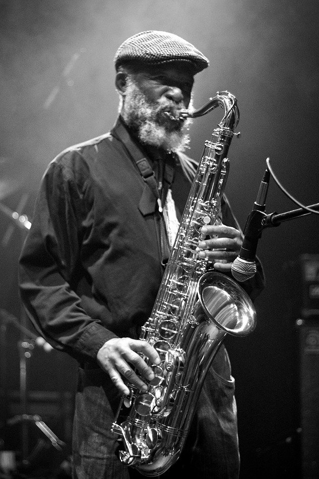 El saxofonista Cedric "Im" Brooks, músico de la banda jamaiquina The Skatalites brindando un concierto en Uruguay en 2009.